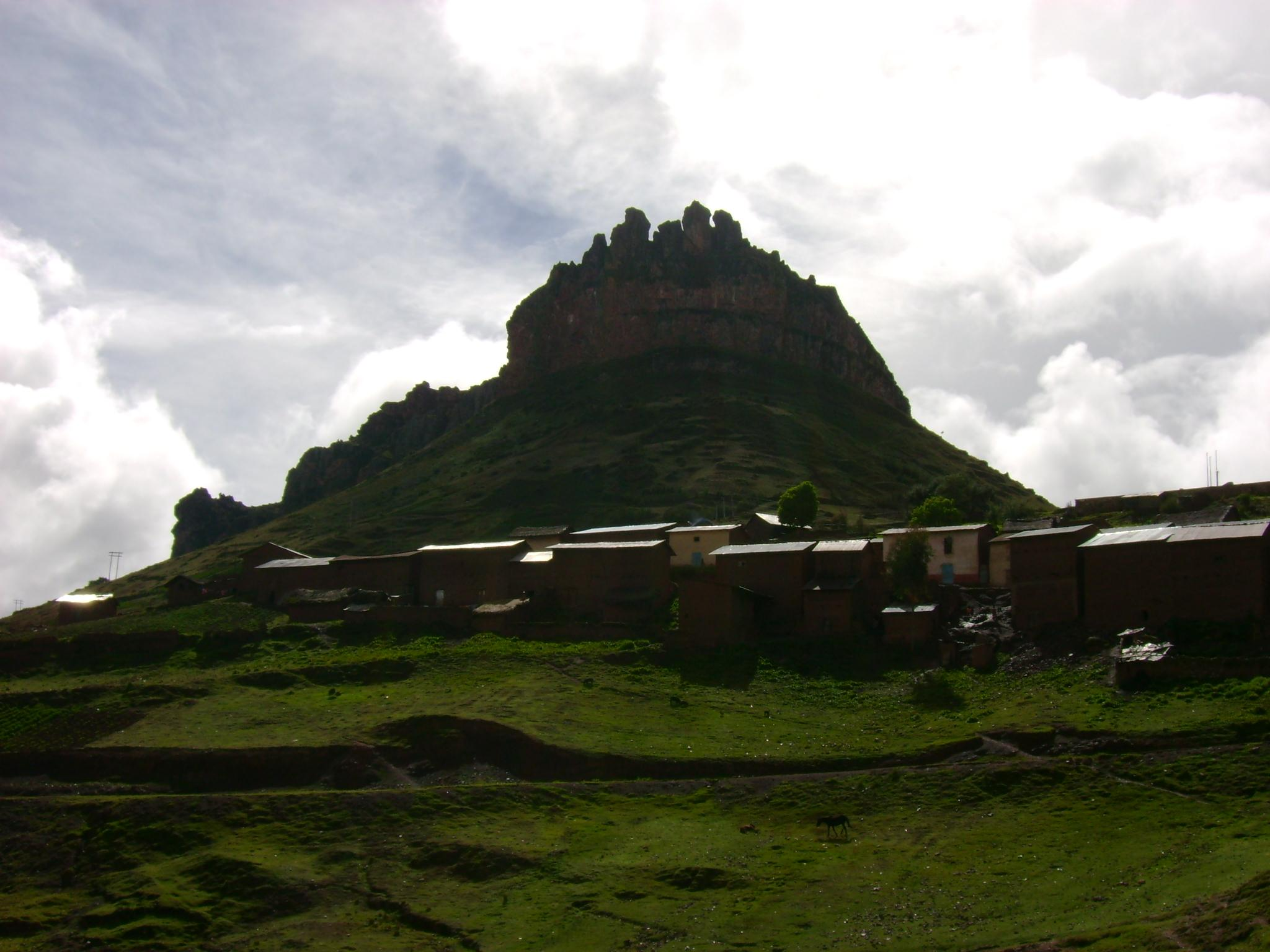 La Corona del Inca.